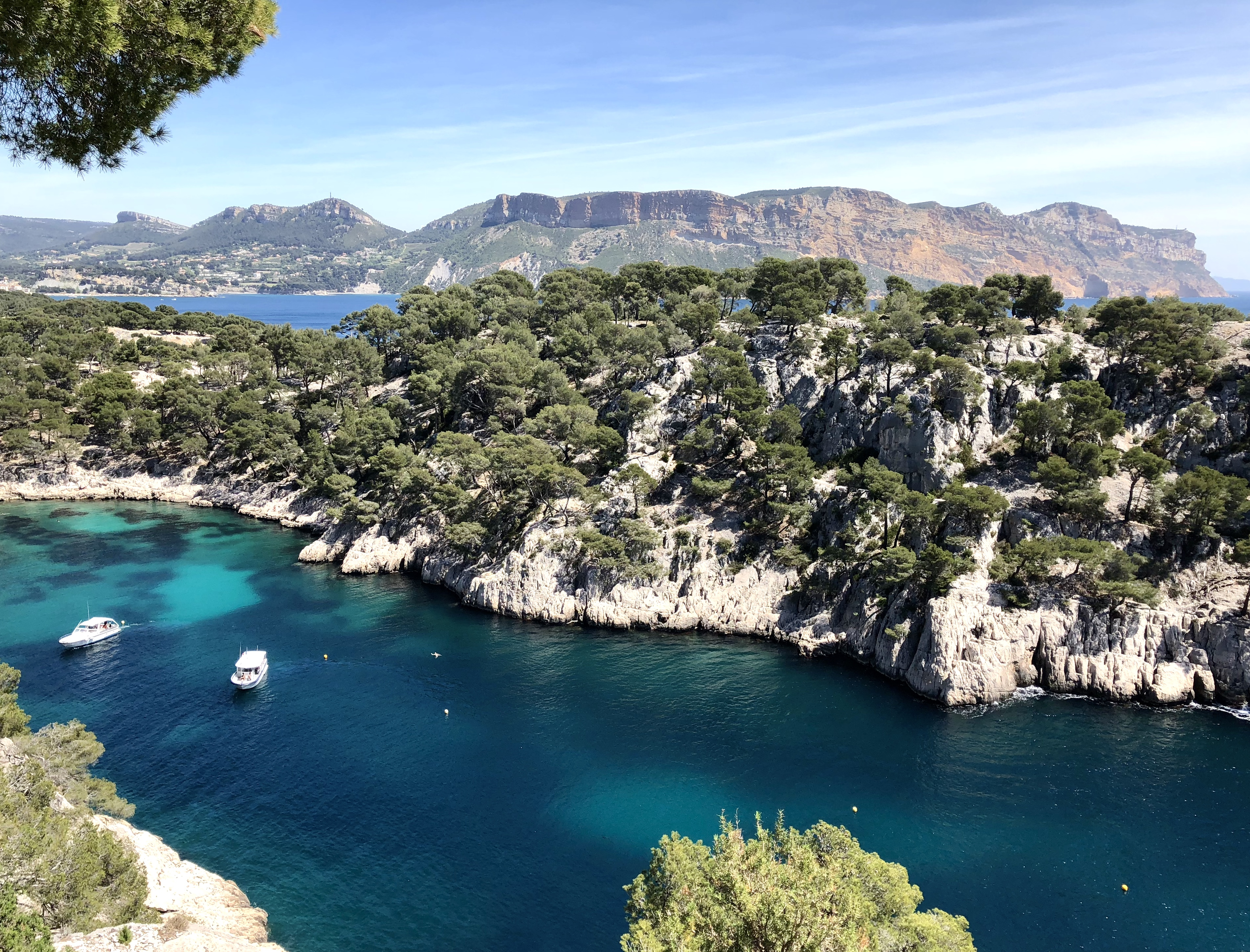 Rando Marche Nordique